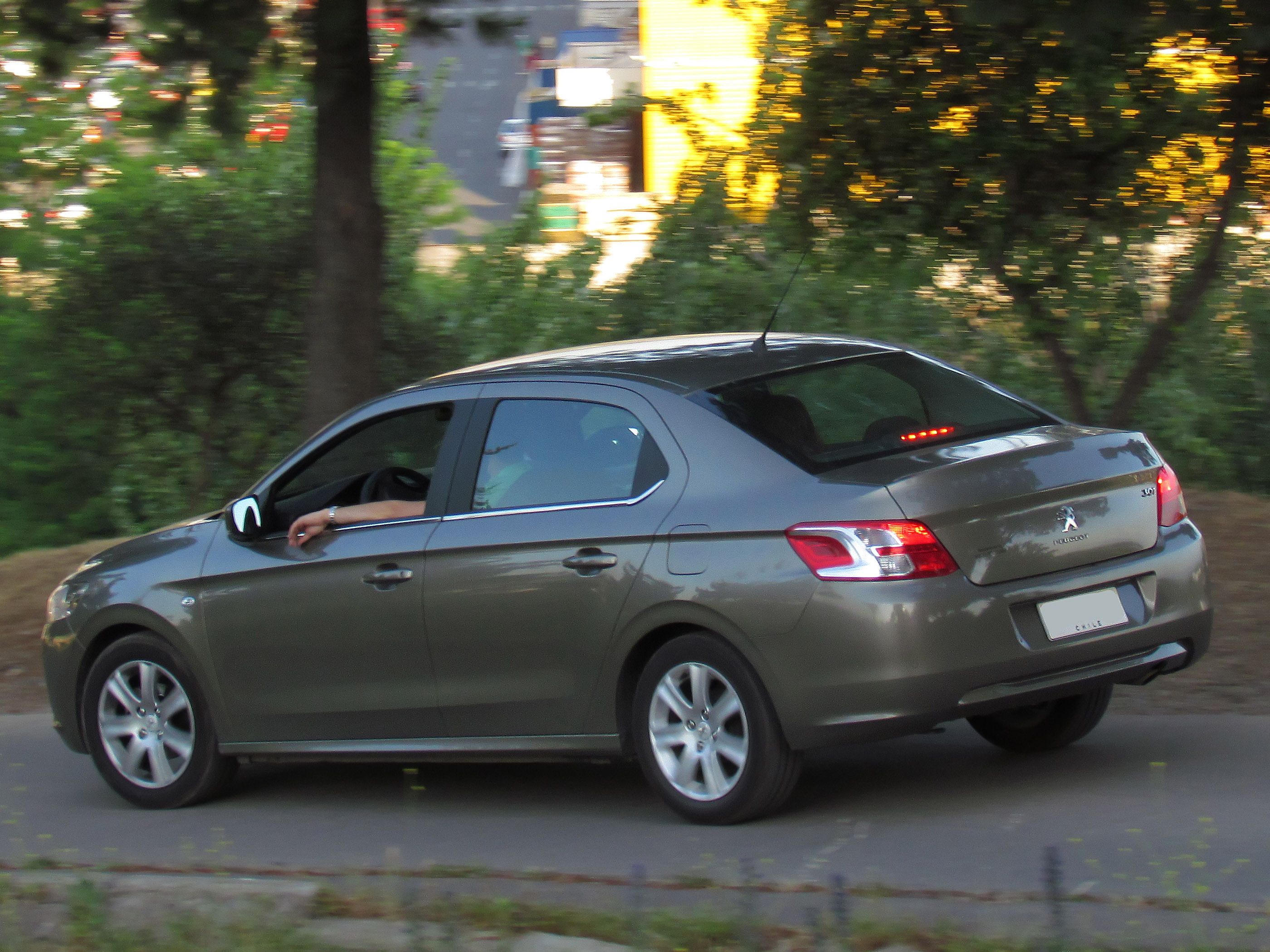 Peugeot 301 1.6 HDi Allure 2013